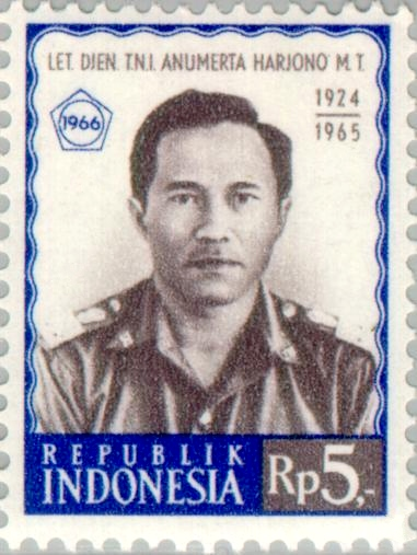 Mas Tirtodarmo Haryono